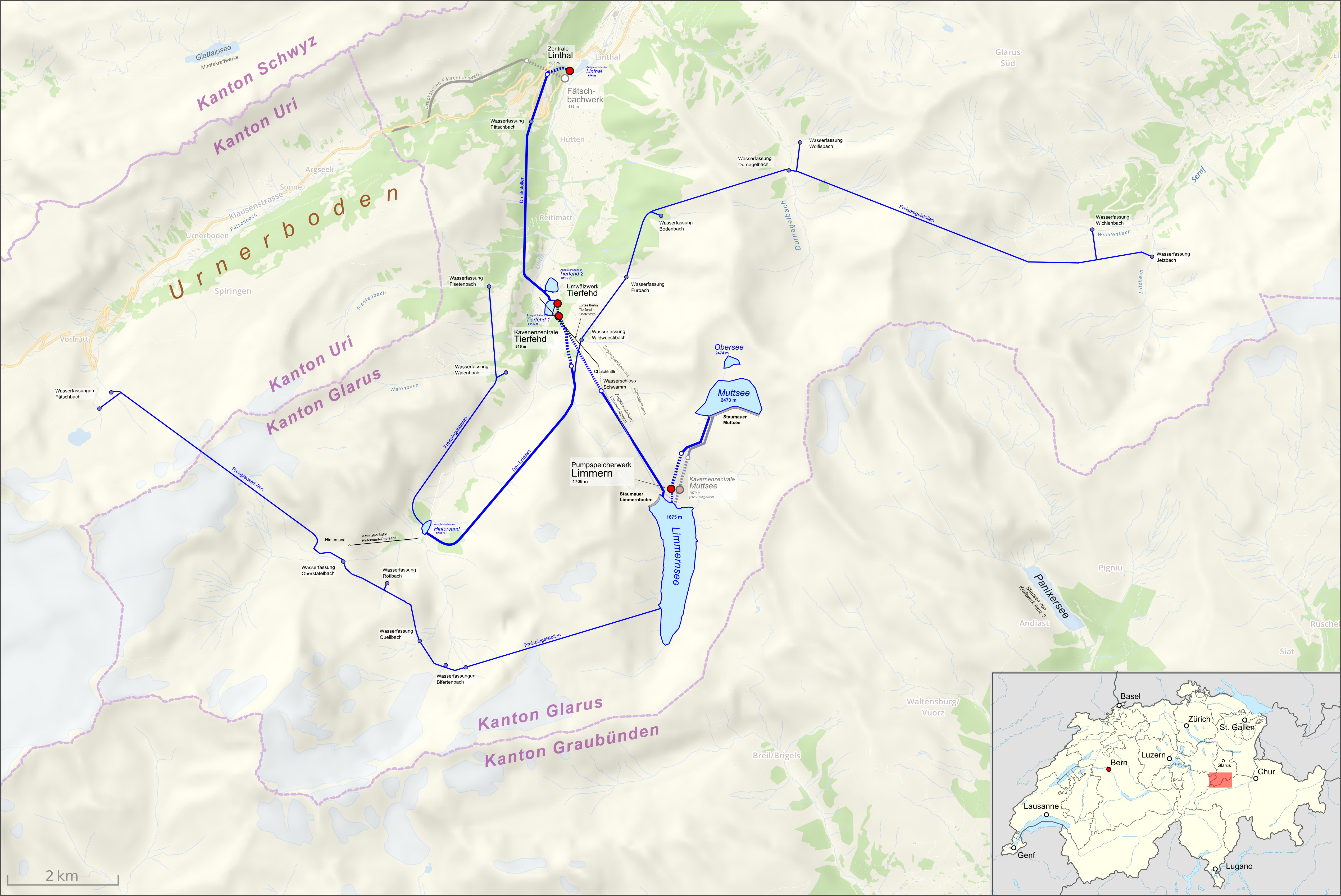 Lagekarte der Kraftwerke Linth-Limmern